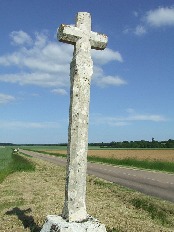 Calvaire familial près du cimetière d'Étais-la-Sauvin